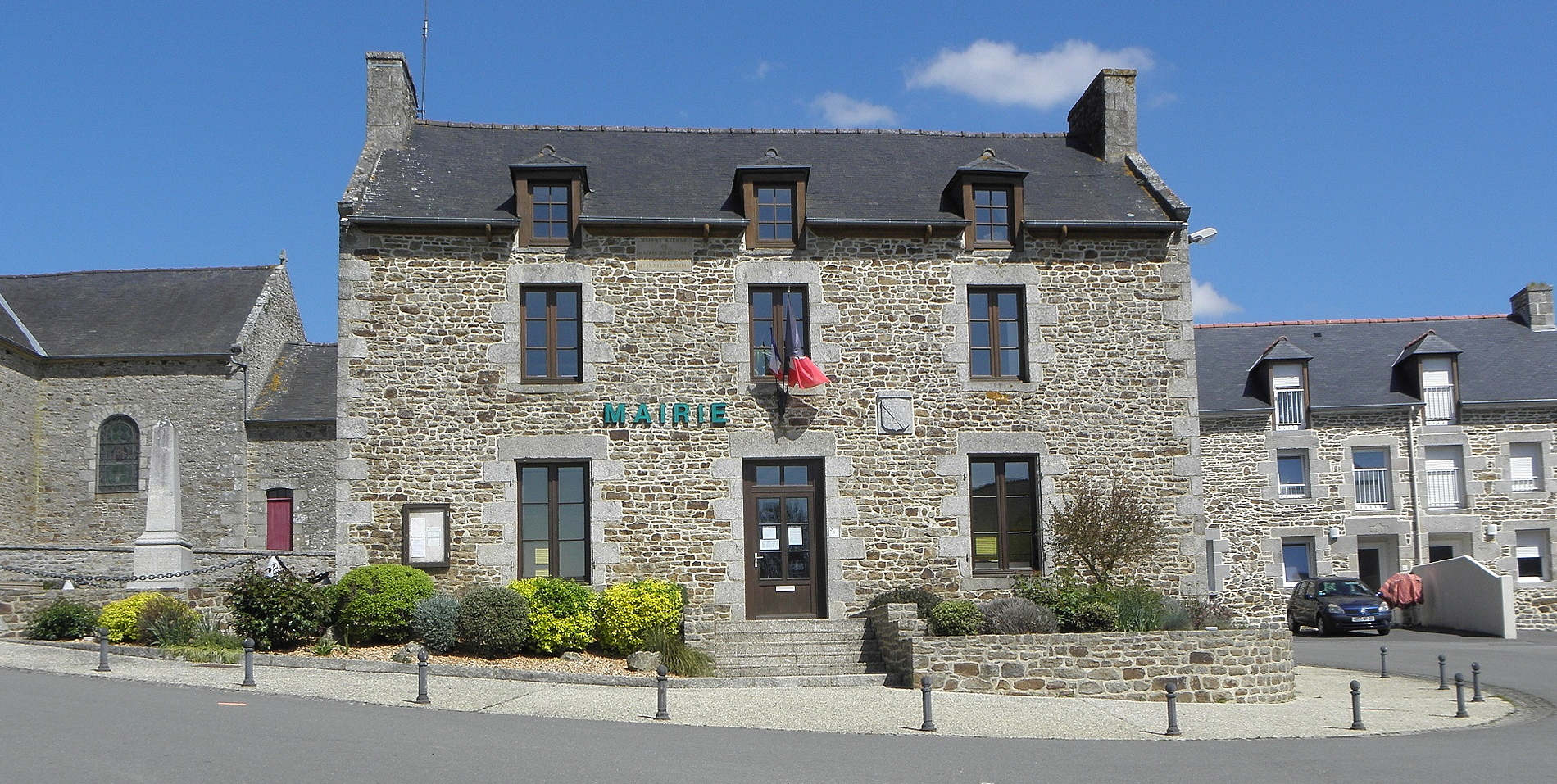 Mairie de Saint-Carné (22).